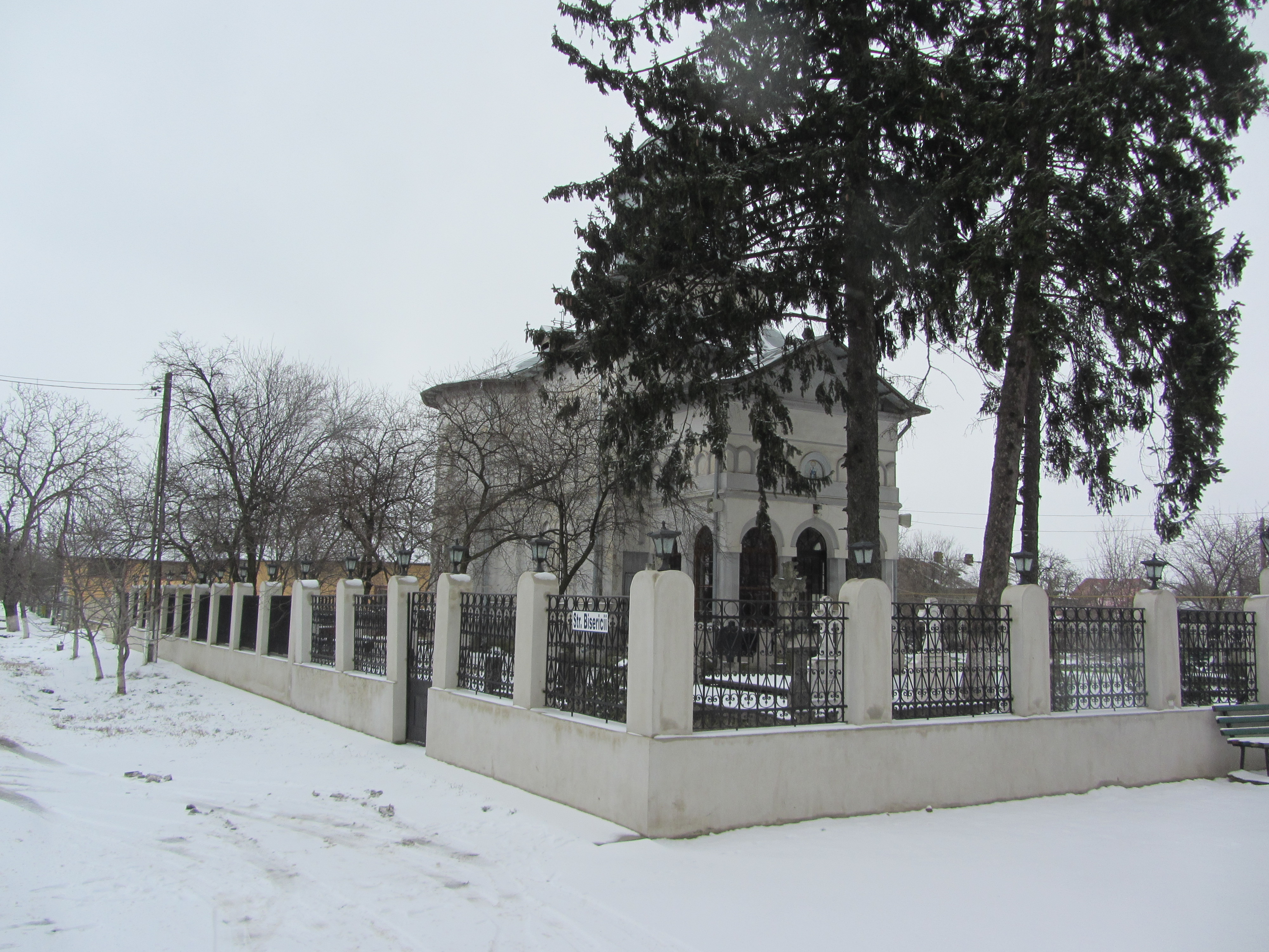 Biserica „Sf. Nicolae” - sat Florești, str. Mihai Viteazul nr. 77, comuna Florești-Stoenești, județul Giurgiu